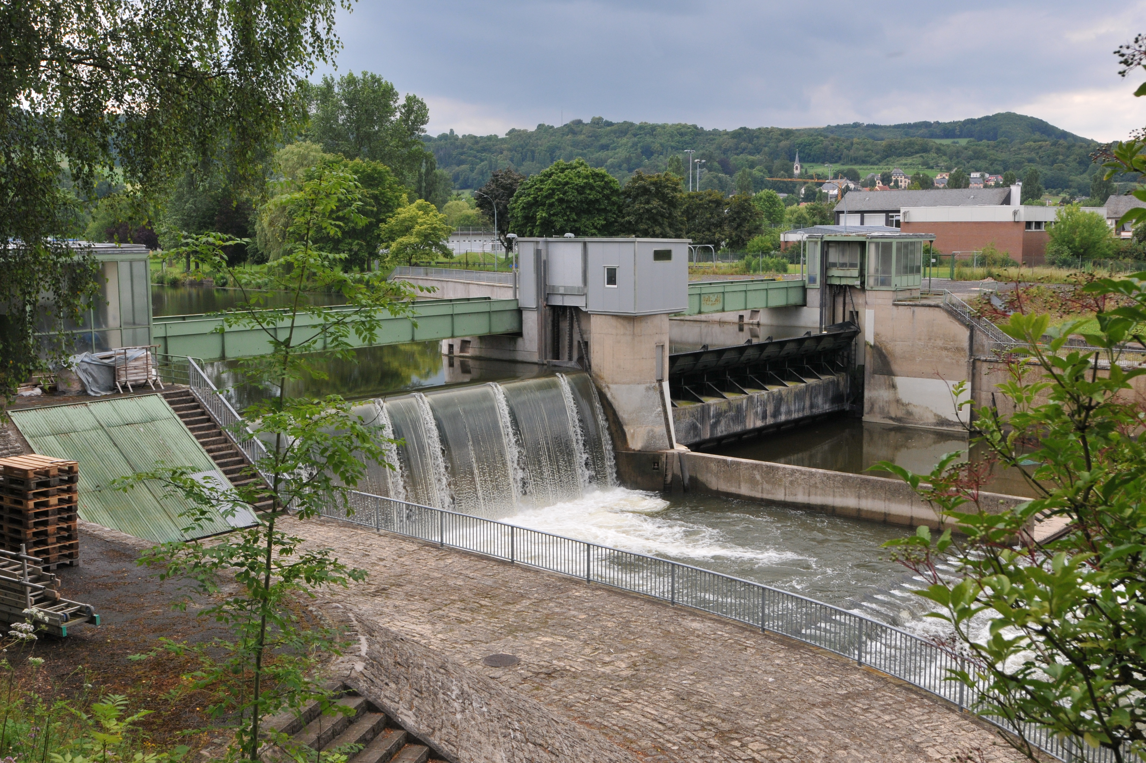 De Staudamm zu Rouspert . This photograph was taken with a Nikon D300.